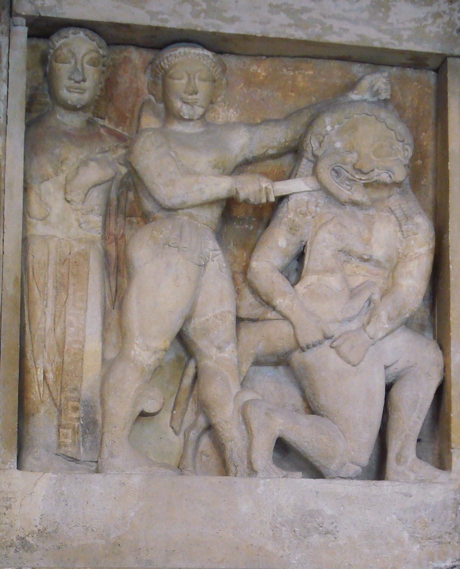 Dal Tempio C di Selinunte: Perseo e Medusa. Sec. VI a.C. cropped Museo archeologico regionale di Palermo, 28 settembre 2006. Foto di Giovanni Dall'Orto.